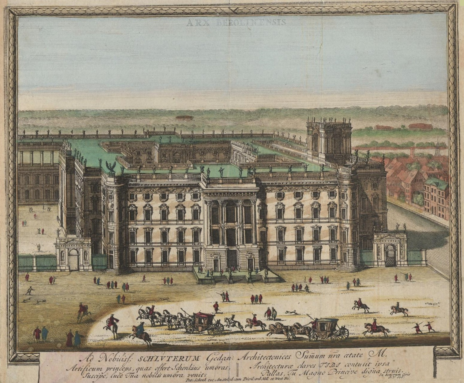 Berliner Schloss nach dem vermutlich ersten Entwurf für die Neugestaltung nach Plänen von A. Schlüter